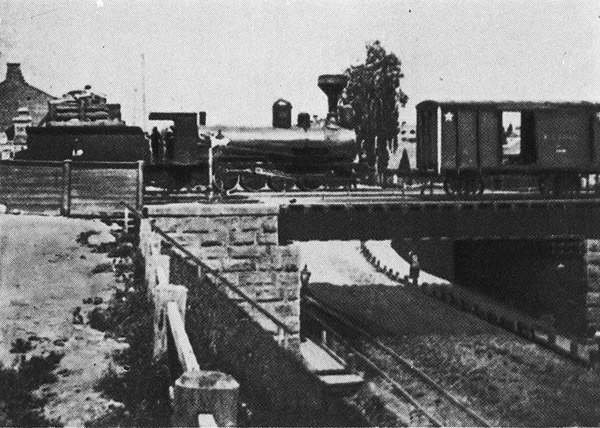 Беларуская (тарашкевіца): Чыгуначны мост у бок Уборак